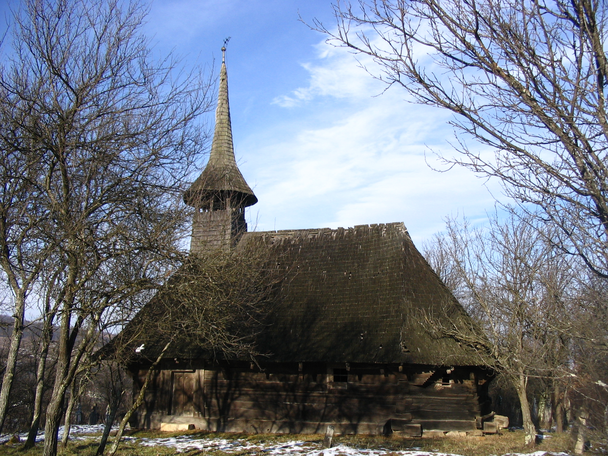 Biserica din Zimbor, Sălaj. Autor: Bogdan Ilieş Data: decembrie 2005 Categorie:Biserici de lemn din Sălaj (imagini)